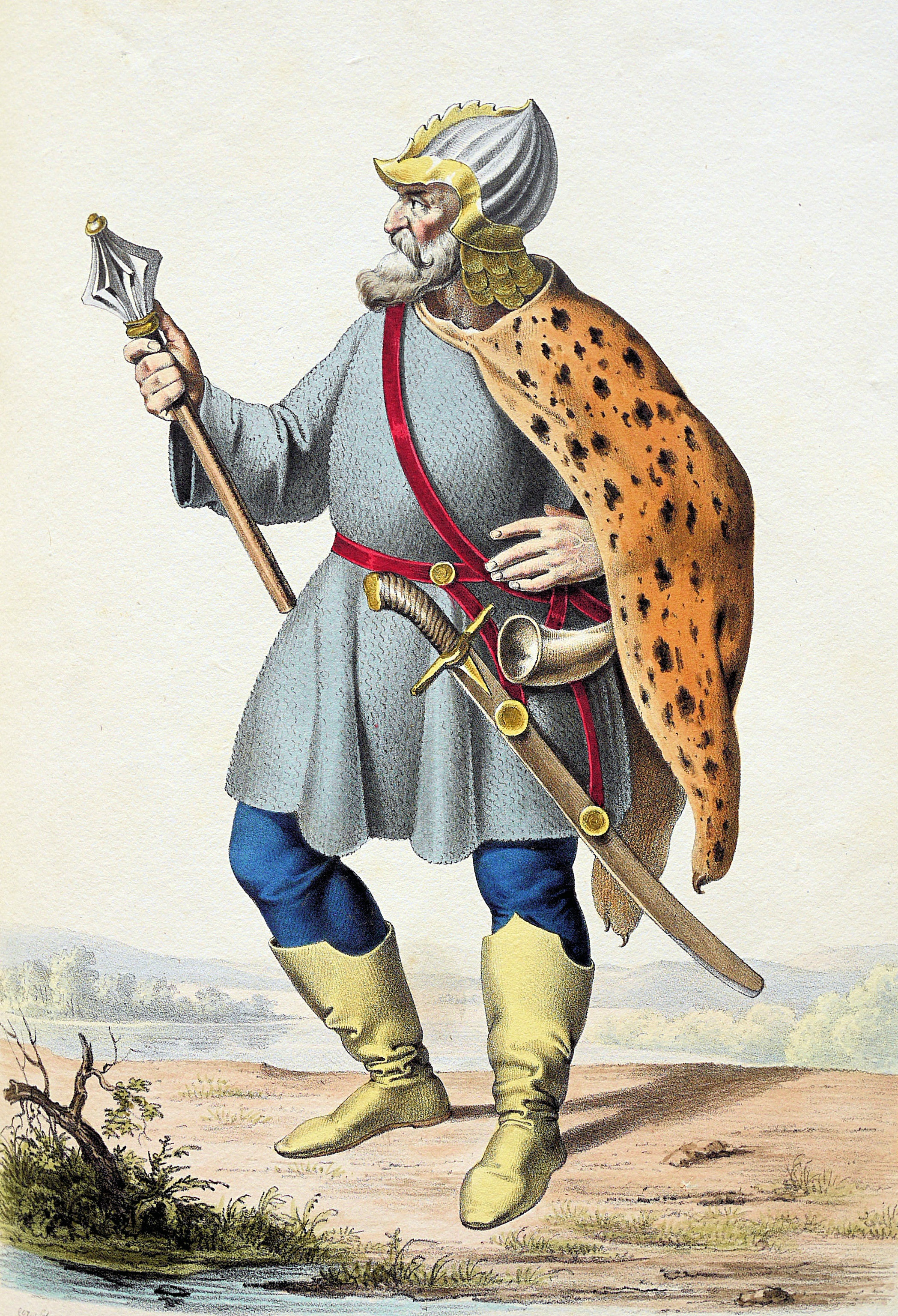 Árpád, Lithographie von Josef Kriehuber nach einer Zeichnung von Moritz von Schwind aus Ungerns Erste Heerführer Herzoge und Koenige In einer Reihe von Bildnissen von Bela bis auf Seine Majestät Franz I. Kaiser Von Österreich König Von Ungern &c., &c. Wien : Lithographisches Institut ;ca. 1828